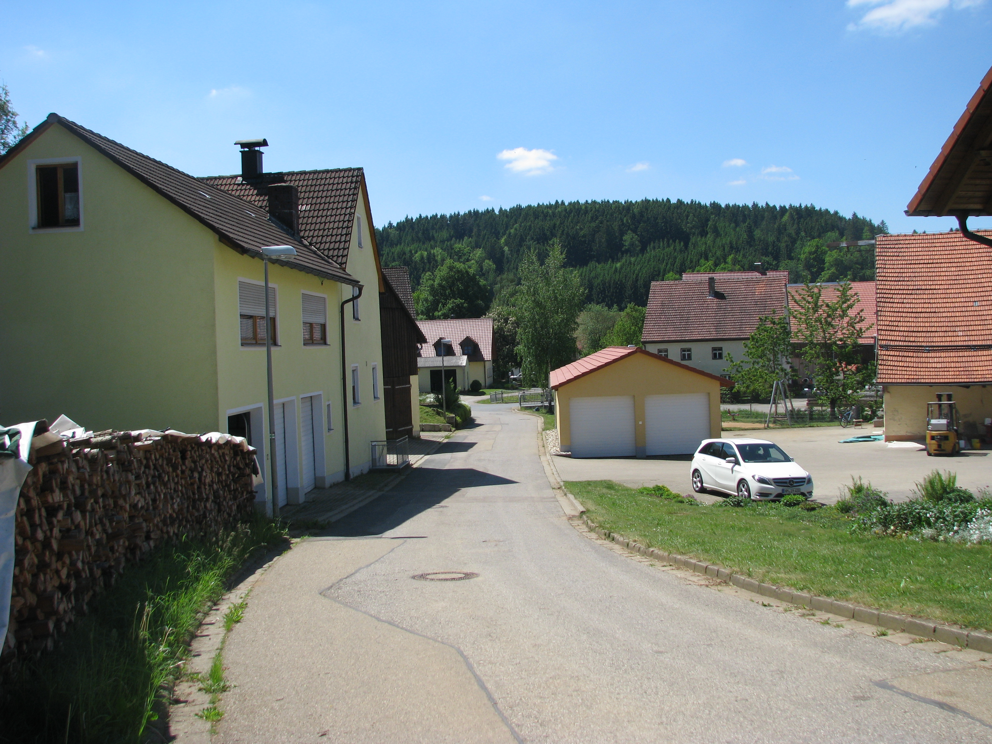 Niederhofen, Ortsteil von Pilsach im Landkreis Neumarkt i. d. Opf.